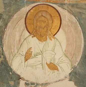 Ветхий деньми (фреска собора Рождества Богородицы Ферапонтова монастыря. Разрез по центральному продольному нефу. Вид на юг)